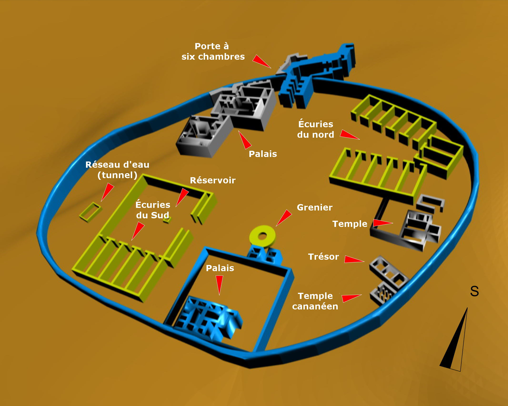 Modélisation de Meggido, en bleu au IXe, et en jaune au VIIIe s. av. J.-C.